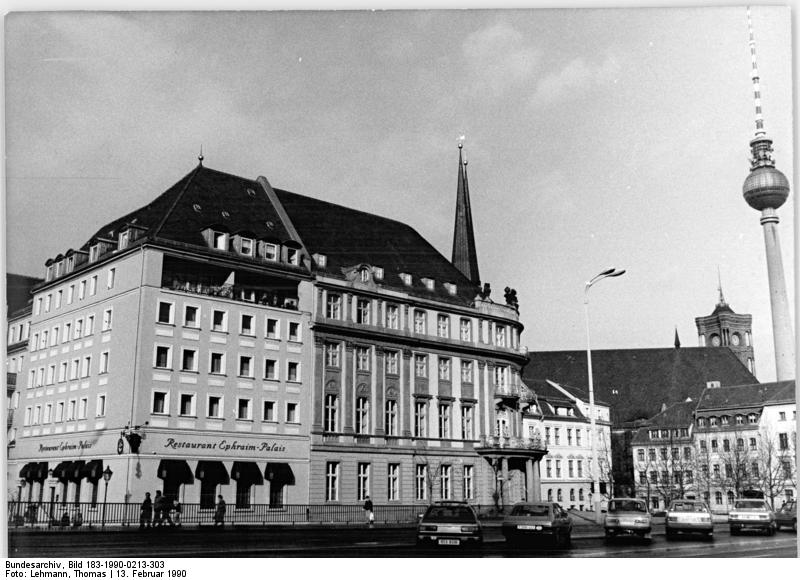 Berlin, Nikolaiviertel, "Ephraimpalais", Fernsehturm ADN-ZB Lehmann 13.2.90 Berlin: Wie wär's mit einem Bummel durch das Nikolaiviertel? Zahlreiche Restaurants und Sehenswürdigkeiten wie das Ephraimpalais - Berlins "schönste Ecke" (Bildmitte) - und der Fernsehturm laden zu einem Besuch ein.